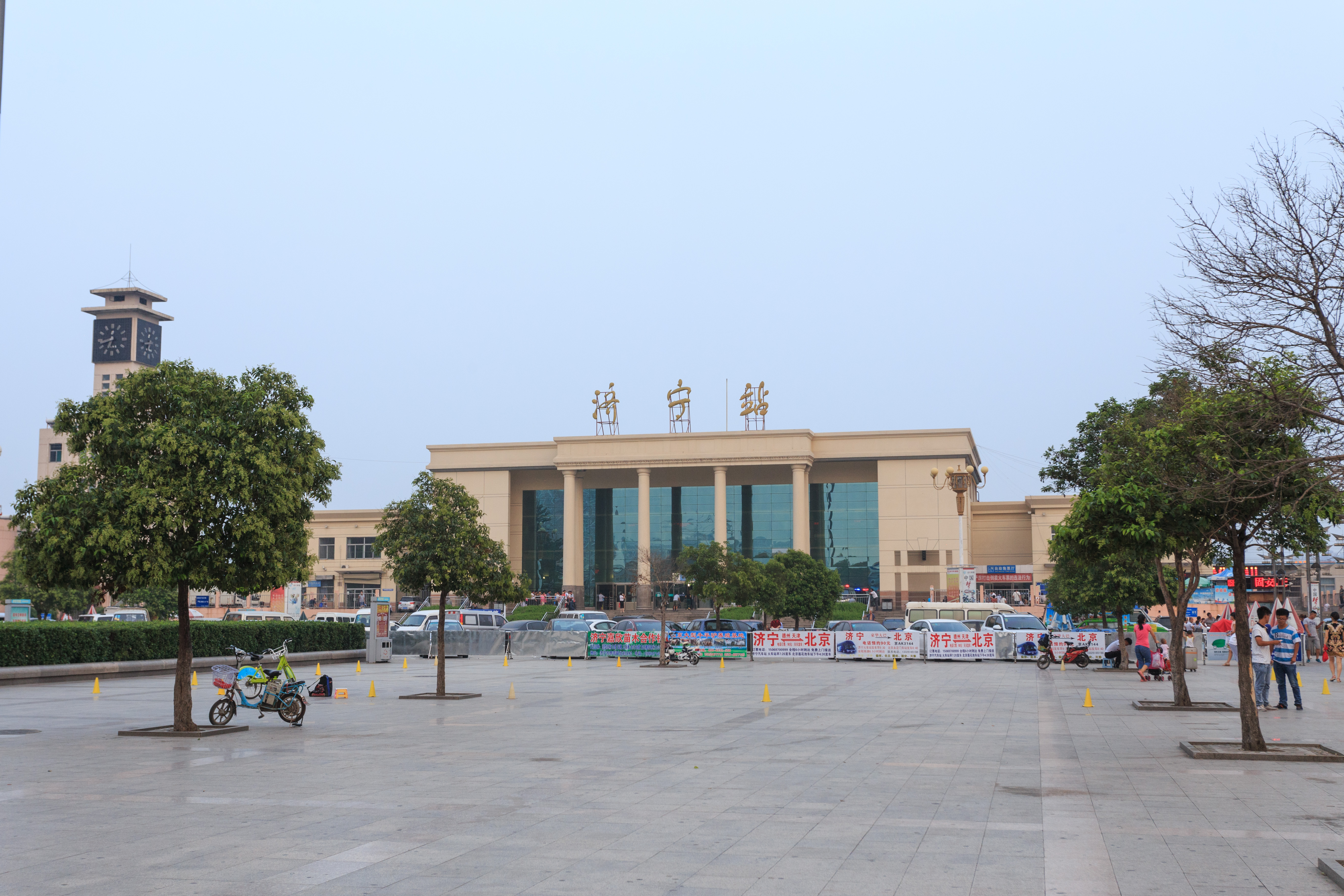 济宁站